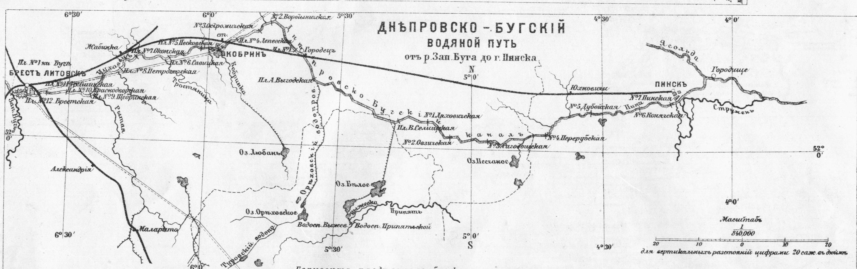 План Днепровско-Бугского водного пути